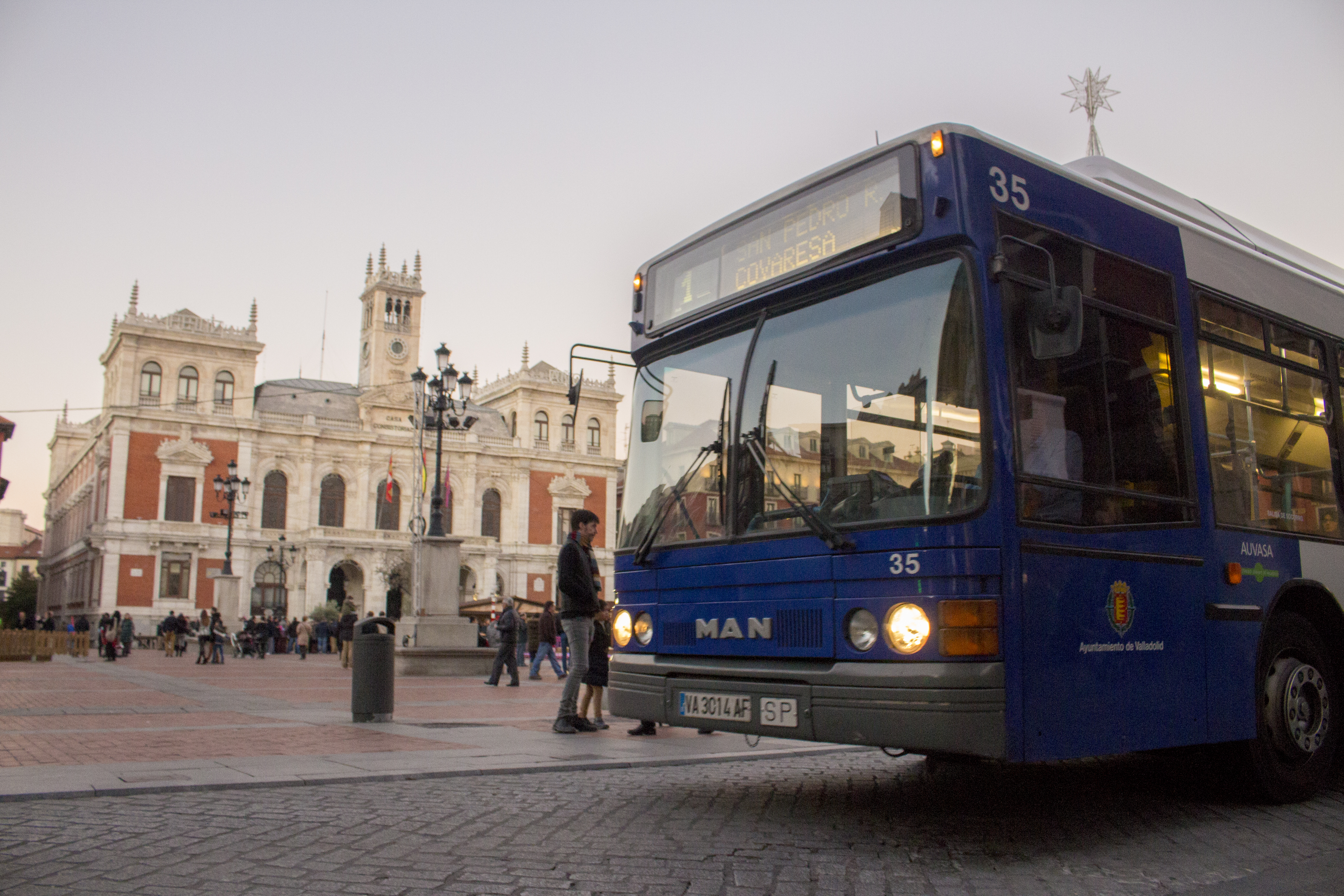 Autobús número 35 de AUVASA Castrosua CS40 City I - MAN NL242 GLP